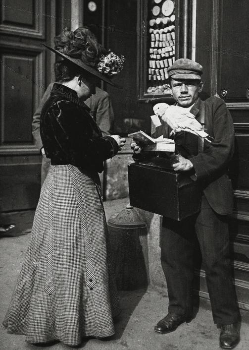 „Planetenverkäufer“ (Verkäufer von Horoskopzetteln), Wien